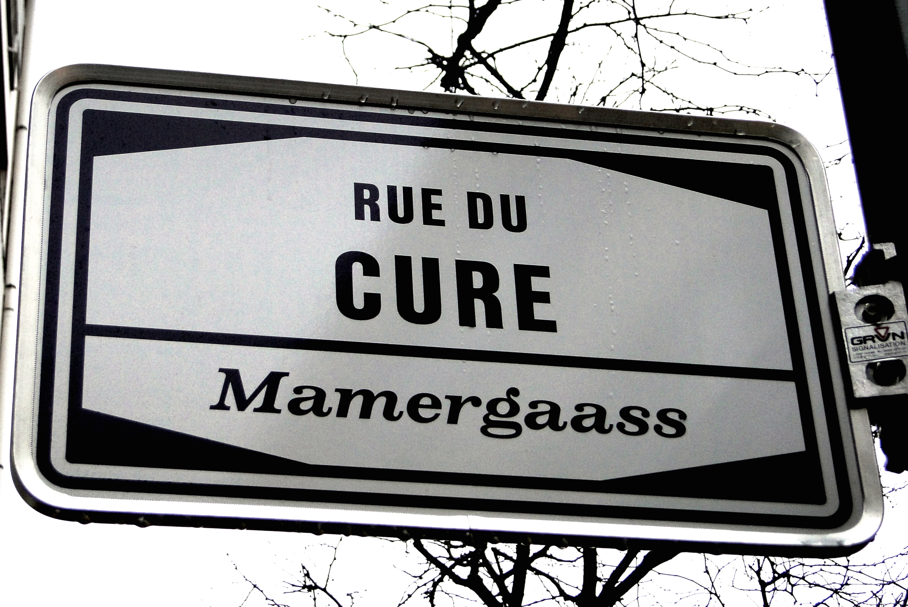 Plaque de nom de rue à Luxembourg